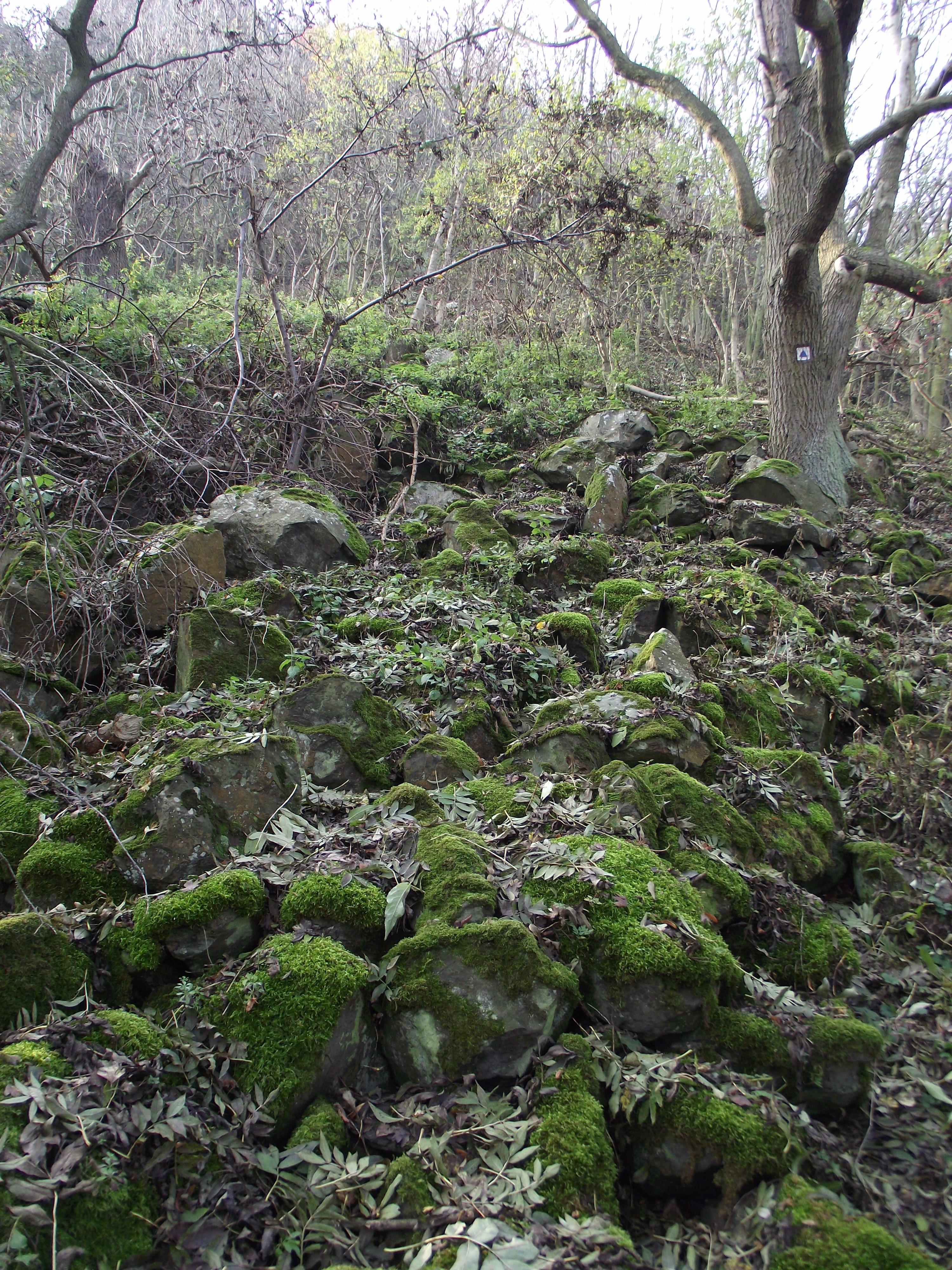 Suťové pole v lese.